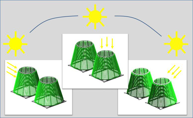 Tannenbaumreaktor, optimierter Lichteinfall